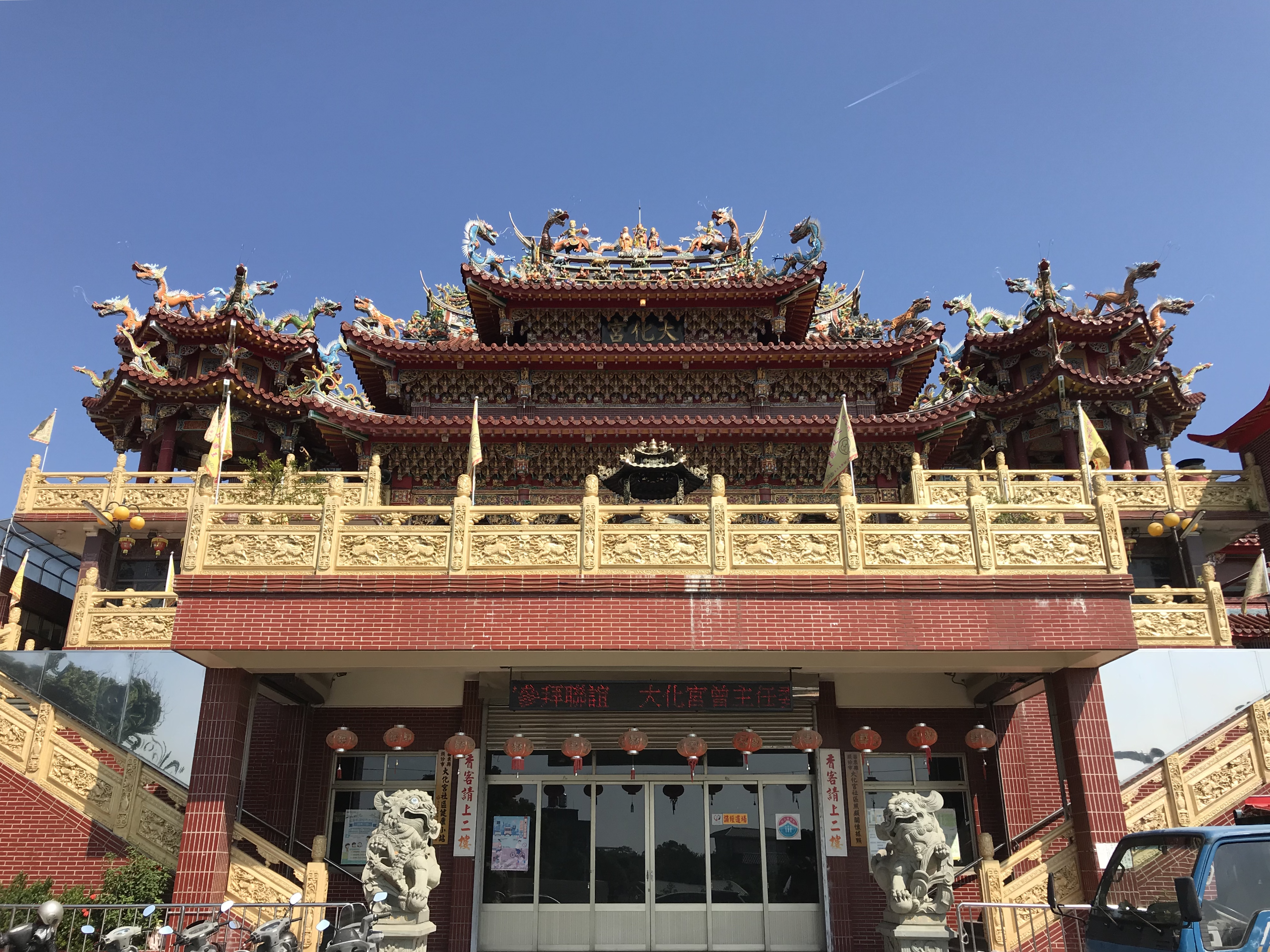 頭份大化宮正面照